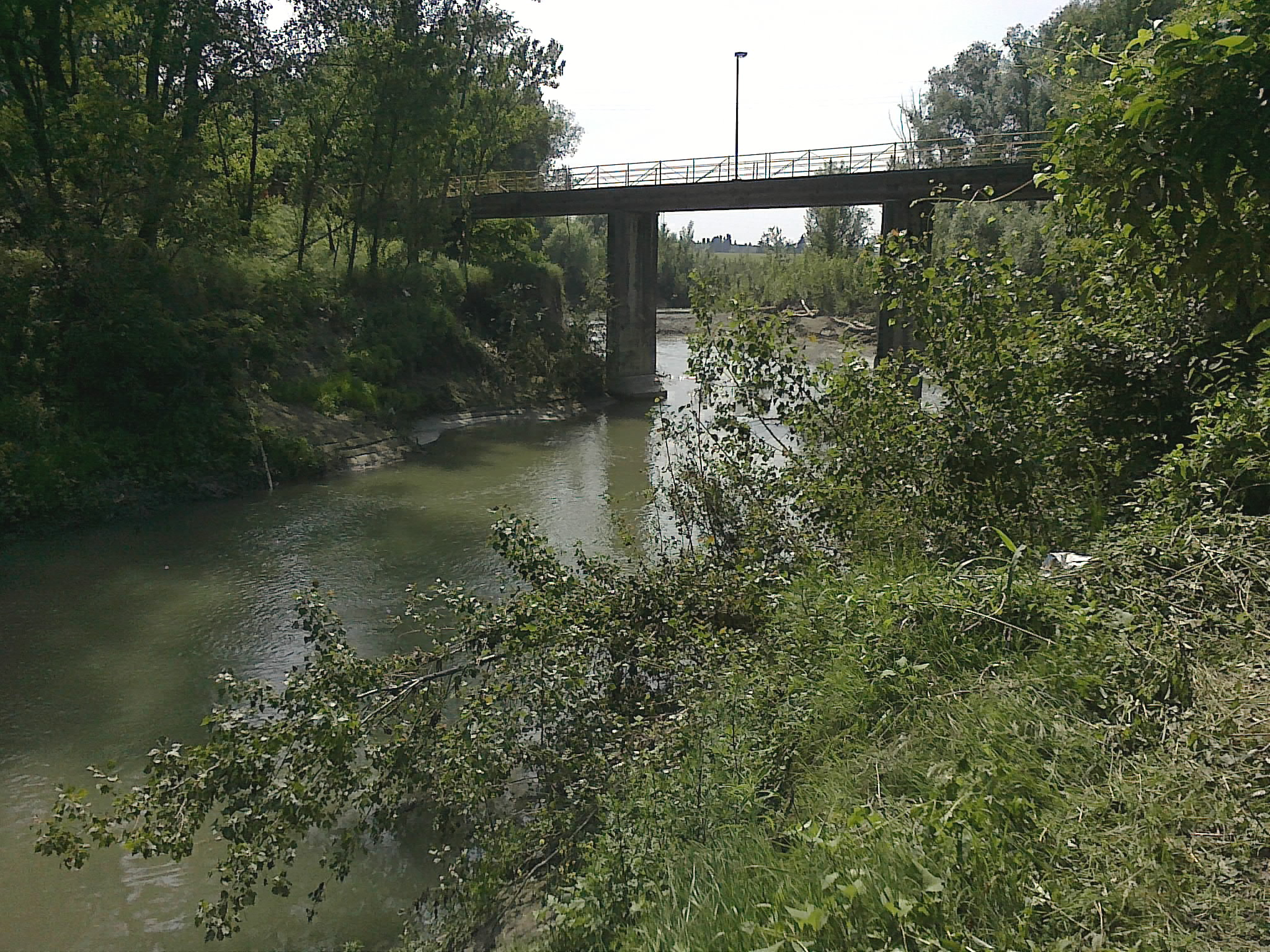 Il torrente Idice vicino a Castenaso